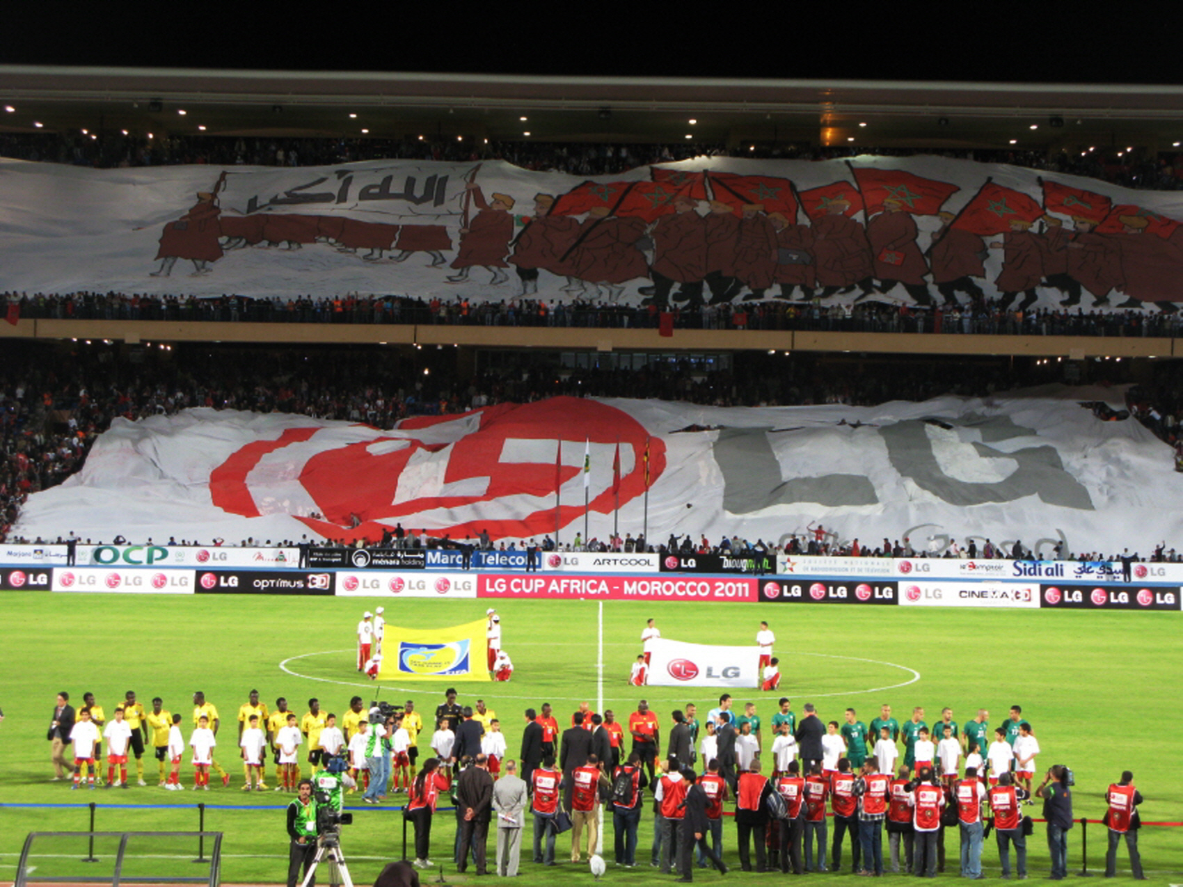 LG전자가 아프리카서 'LG 컵 아프리카 2011'개최하며 차별화 된 스포츠마케팅을 펼쳐 화제를 모았다. 11일, 모로코 마라케쉬 경기장에서 열린 'LG 컵 아프리카 2011' 개회식 장면 ※ LG전자 뉴스룸 에서 관련 보도자료를 확인실 수 있습니다.